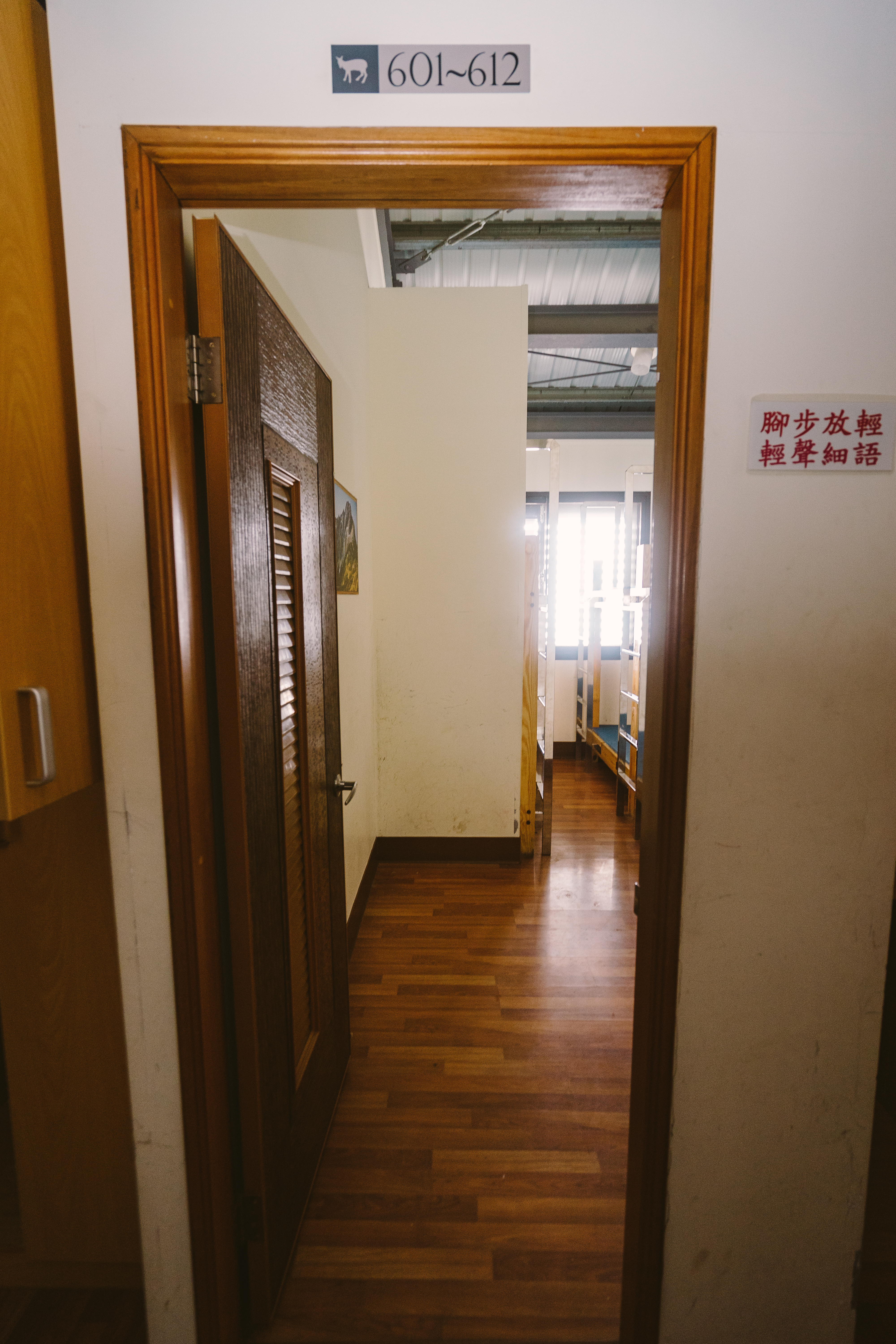 排雲山莊601至612號床位寢室木門。